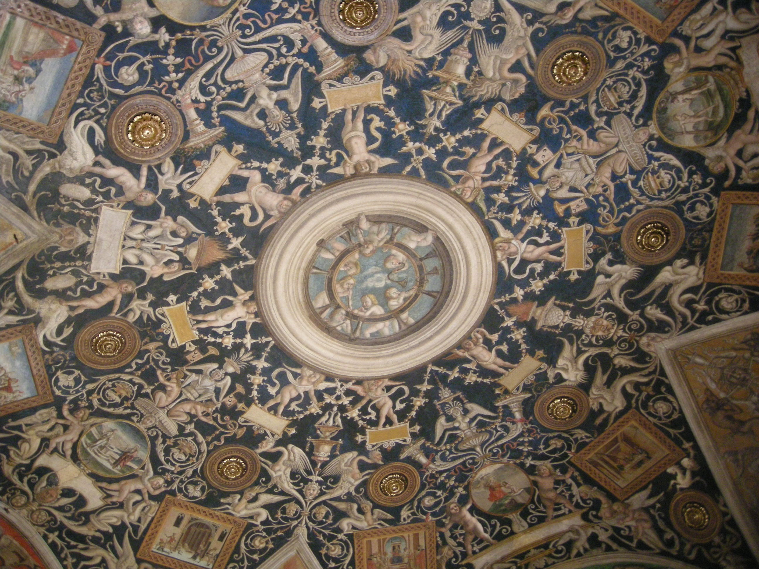 Monastero di San Paolo, stanza con grottesche